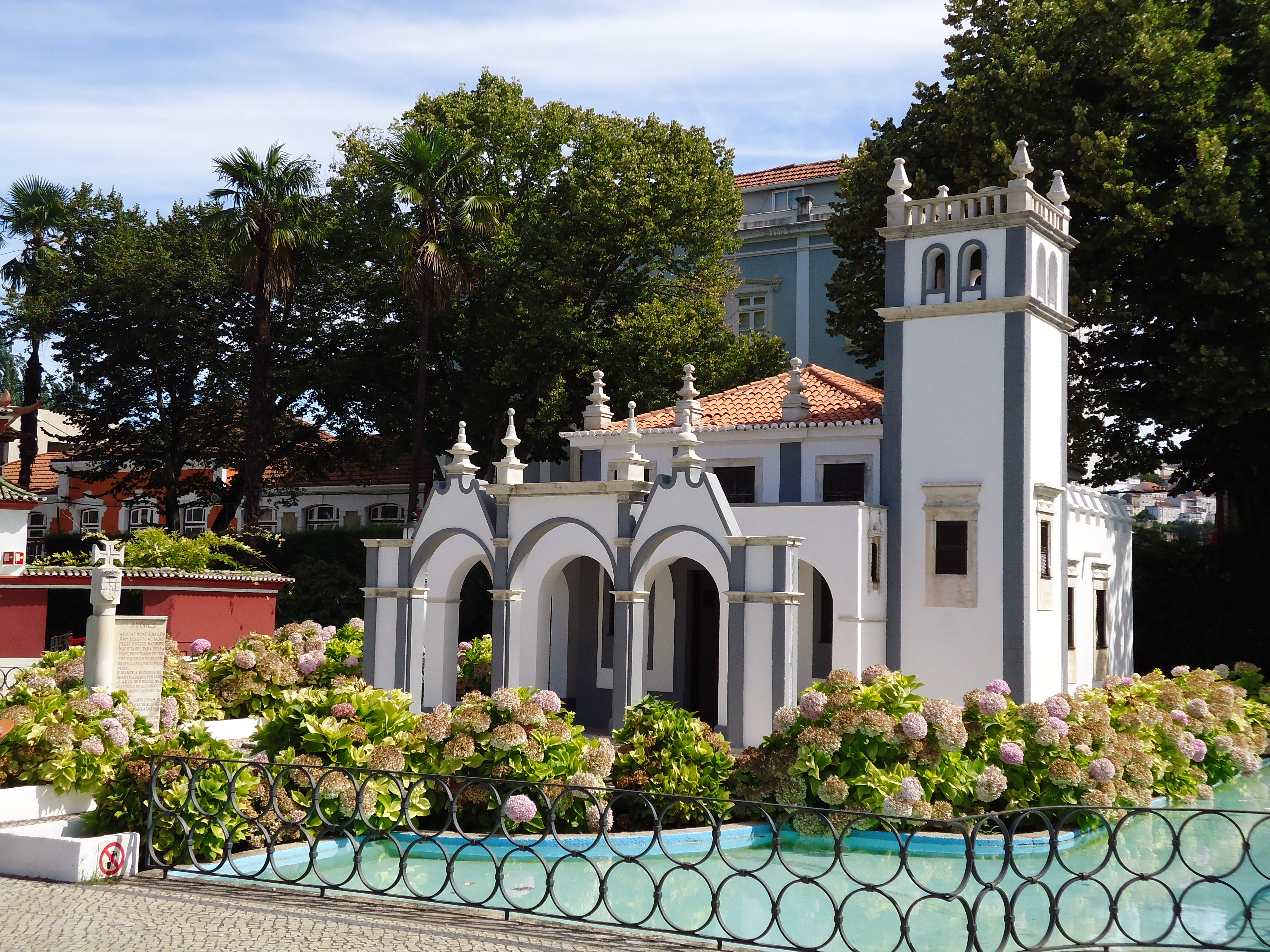 Portugal dos Pequenitos, Coimbra, Portugal: área de Portugal Insular - pavilhão dos Açores.